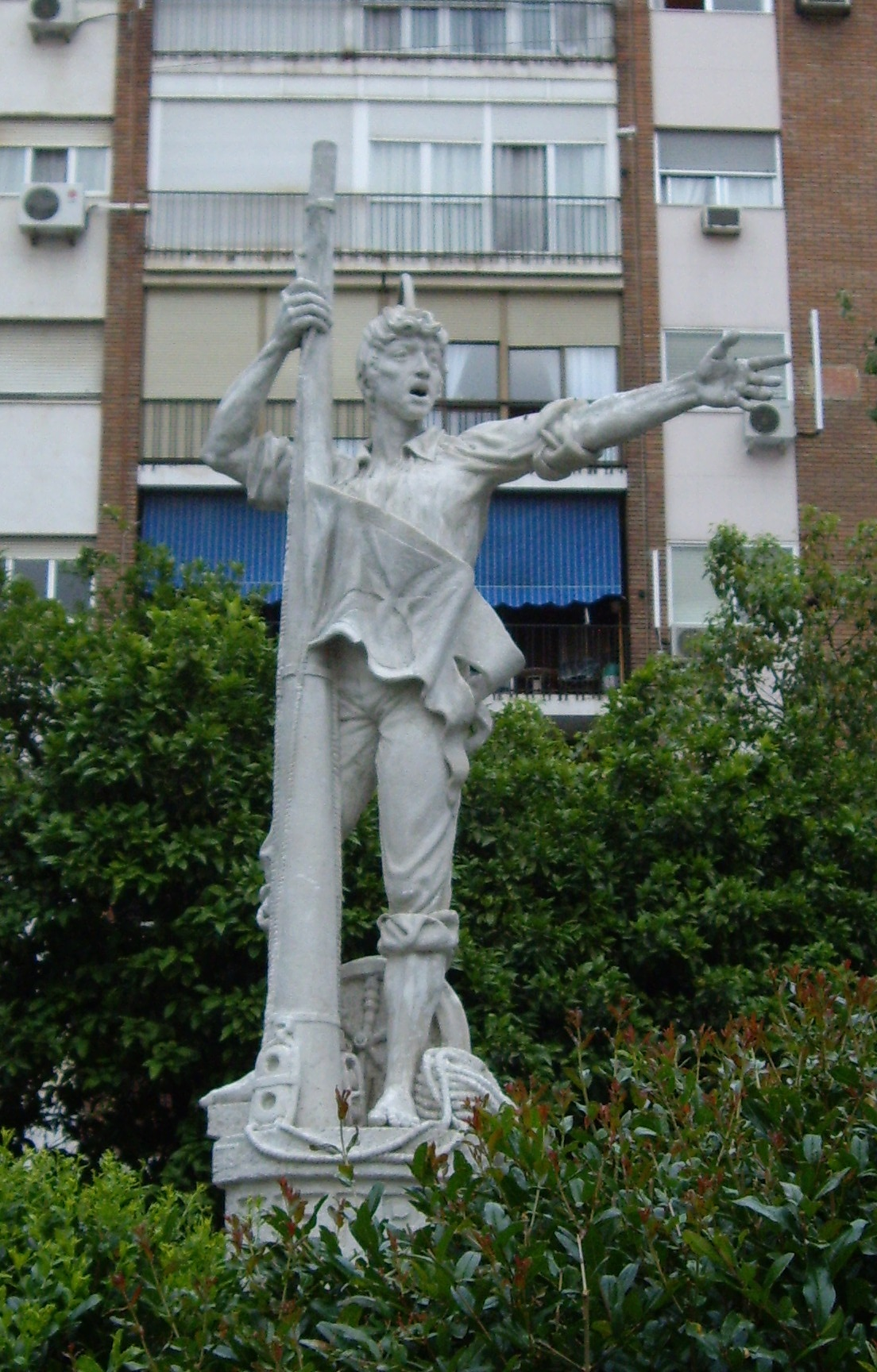 Estatua de Rodrigo de Triana de 1973 en Sevilla, restaurada en 2013